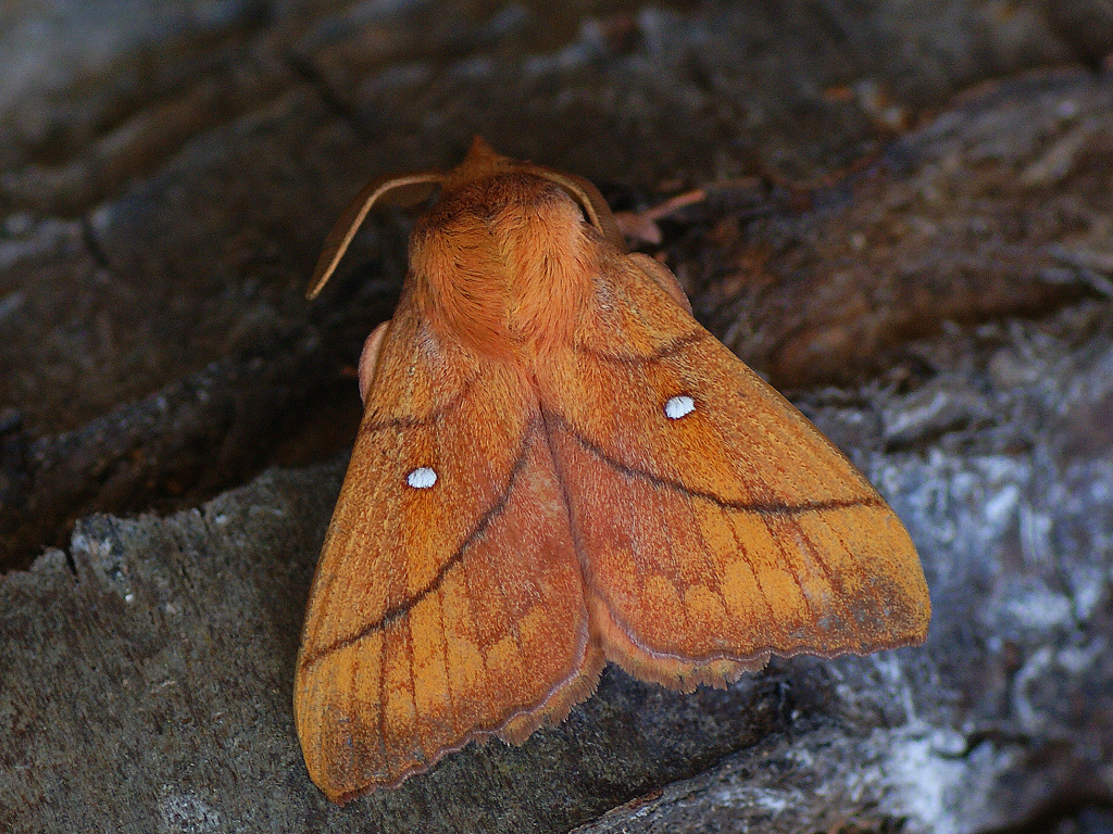 Exemplar found: Russia, Moscow Oblast, Odintsovsky District, near village Pestovo, 08.06.2014, by light МО, Одинцовский р-н, окрестности деревни Пестово, 08.06.2014, на свет